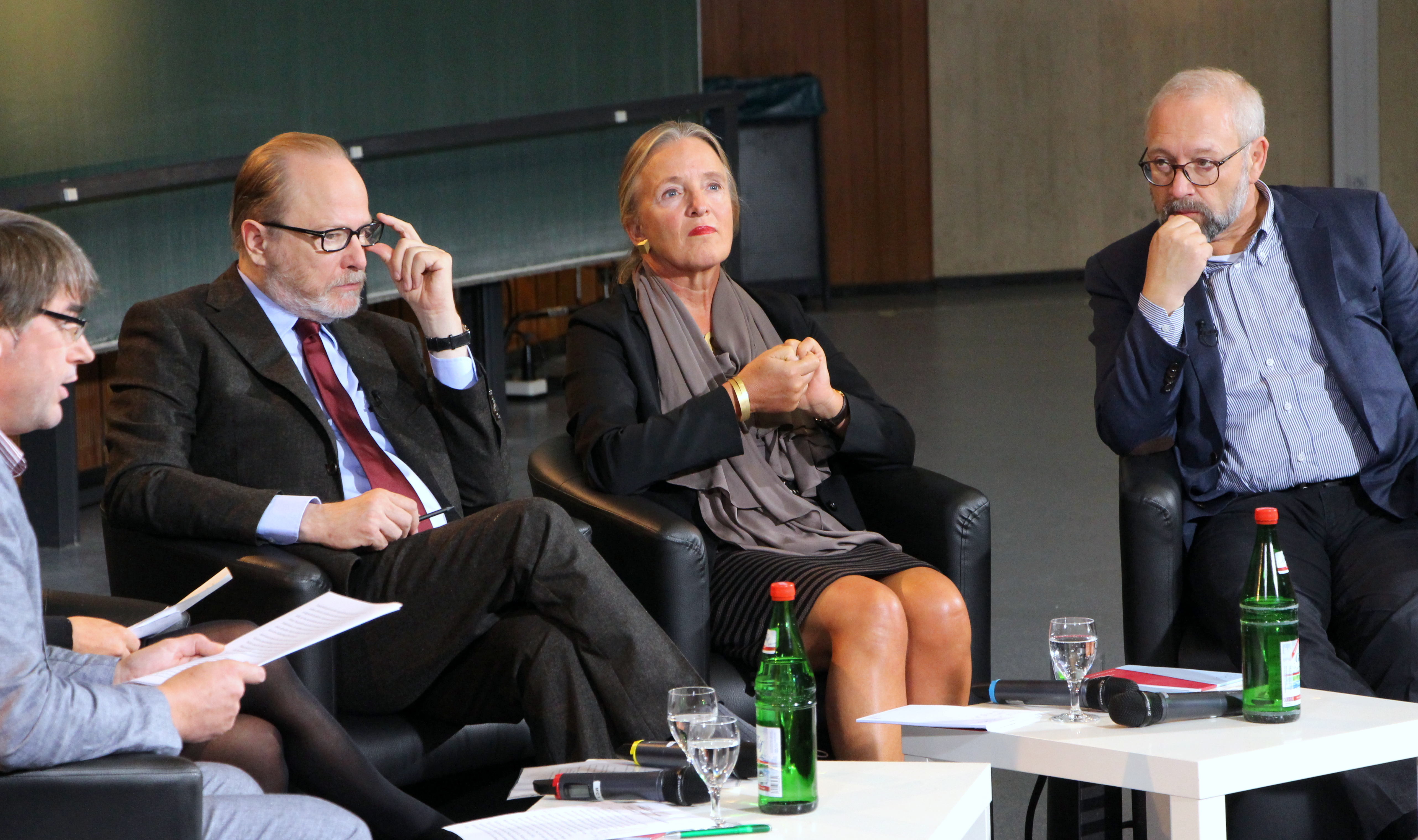 Historikertag 2014 in Göttingen, from left to right: Christoph Classen (ZZF Potsdam), Jan Philipp Reemtsma, Ute Frevert, Herfried Münkler